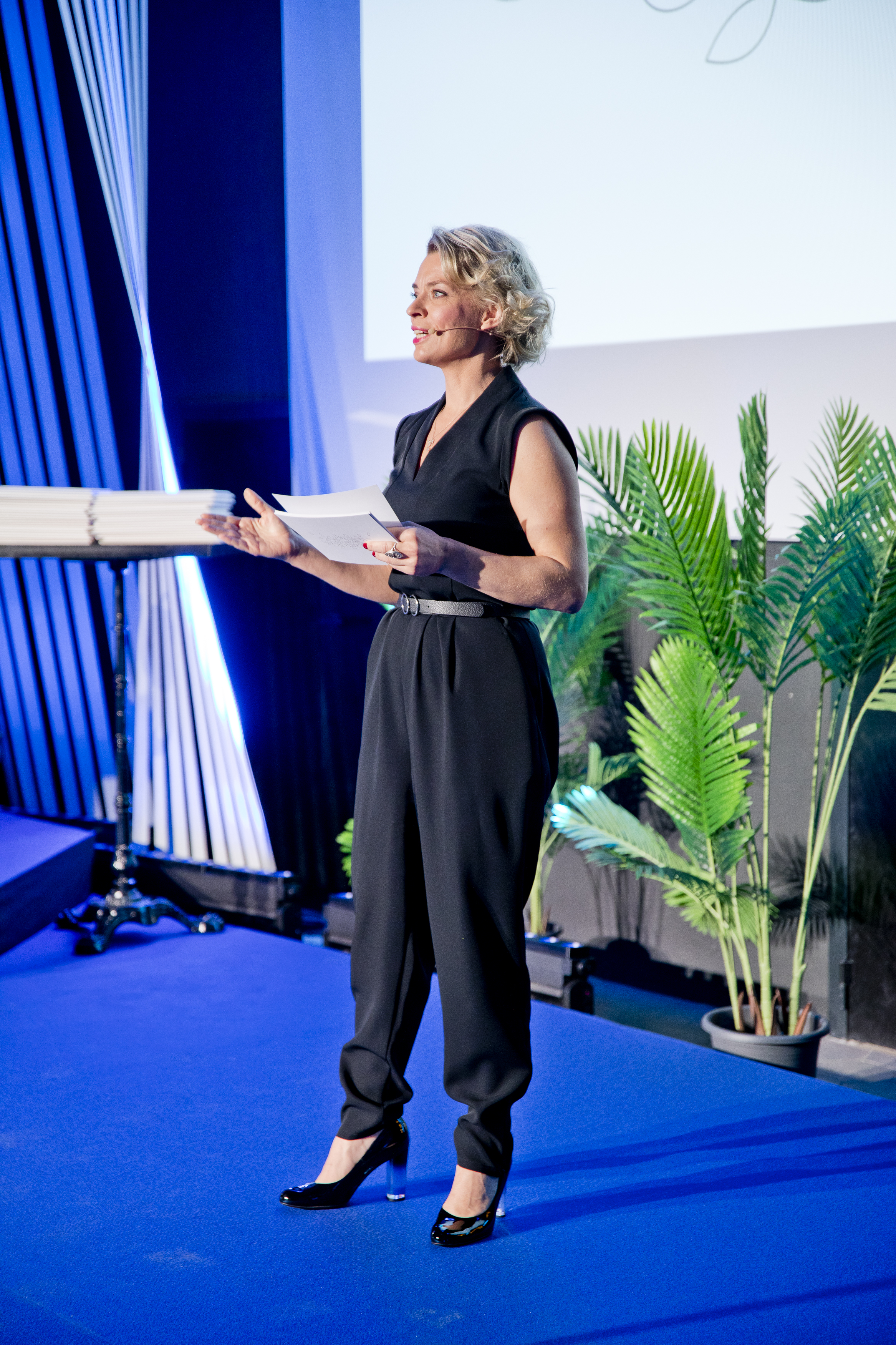 Grete Lõbu, kultuurisõbra tänuüritus